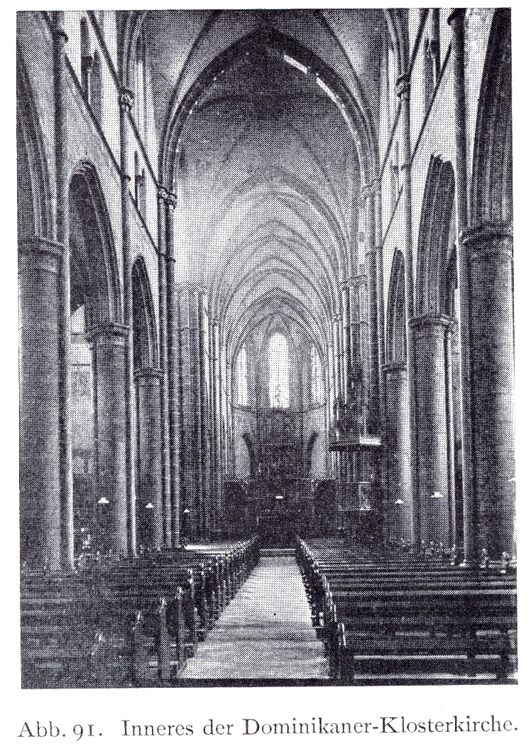 Dominikanerkloster an der Herzogstraße in Düsseldorf, 1867 bis 1887, Dombaumeister Friedrich von Schmidt aus Wien, Inneres der Dominikaner-Klosterkirche.jpg